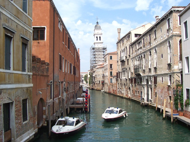 Venezia - Rio S. Giorgio dei Greci